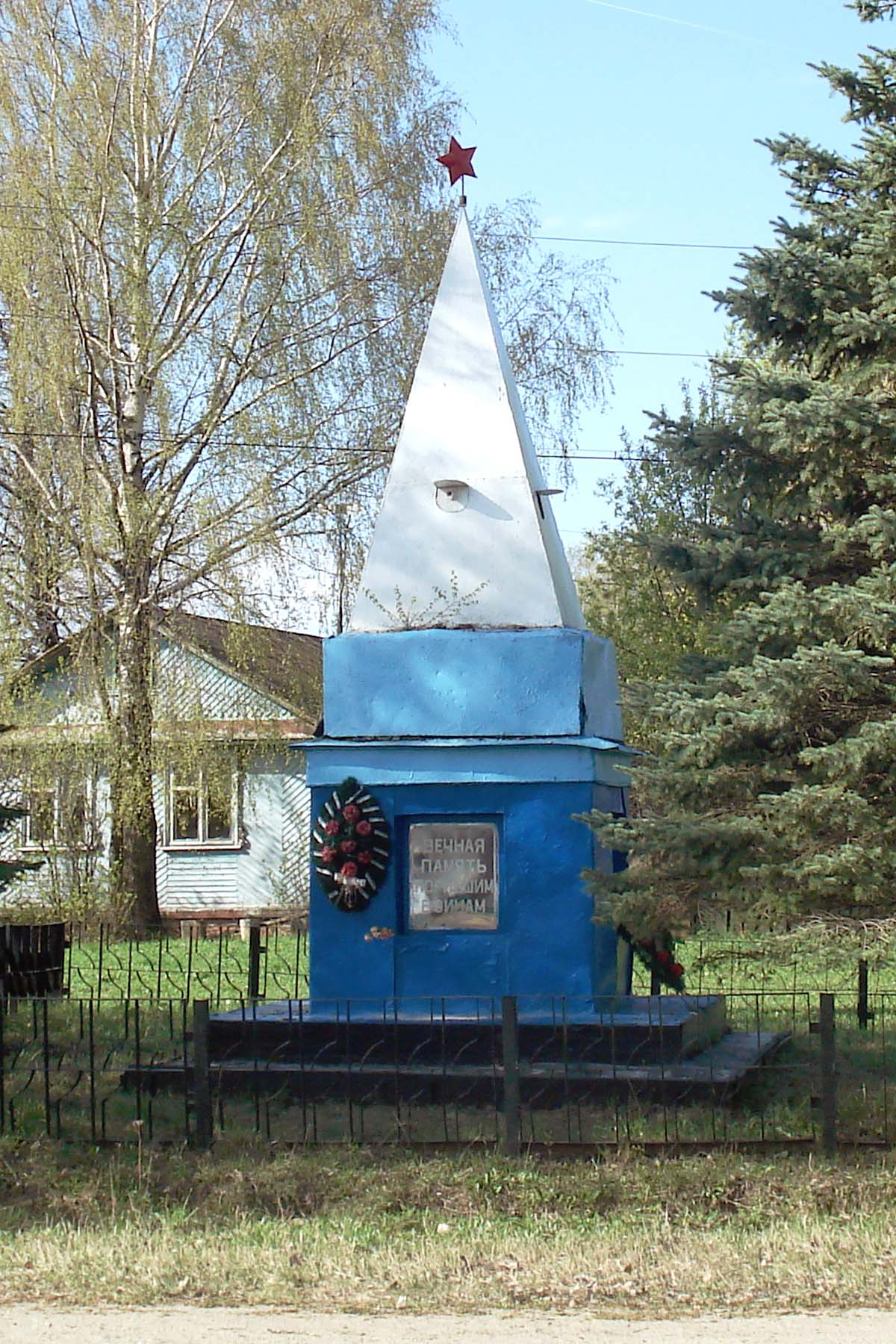 Мемориал Погибшим воинам на месте старообрядческой церкви. Село Федурино Вачского района Нижегородской обл.